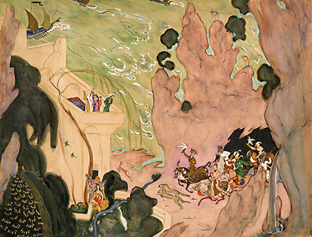 В.А. Серов. Эскиз занавеса для балета «Шехерезада». 1910-1911